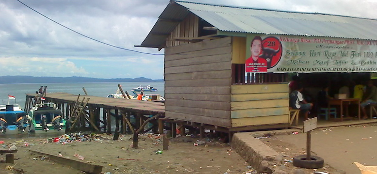 DERMAGA SOFIFI